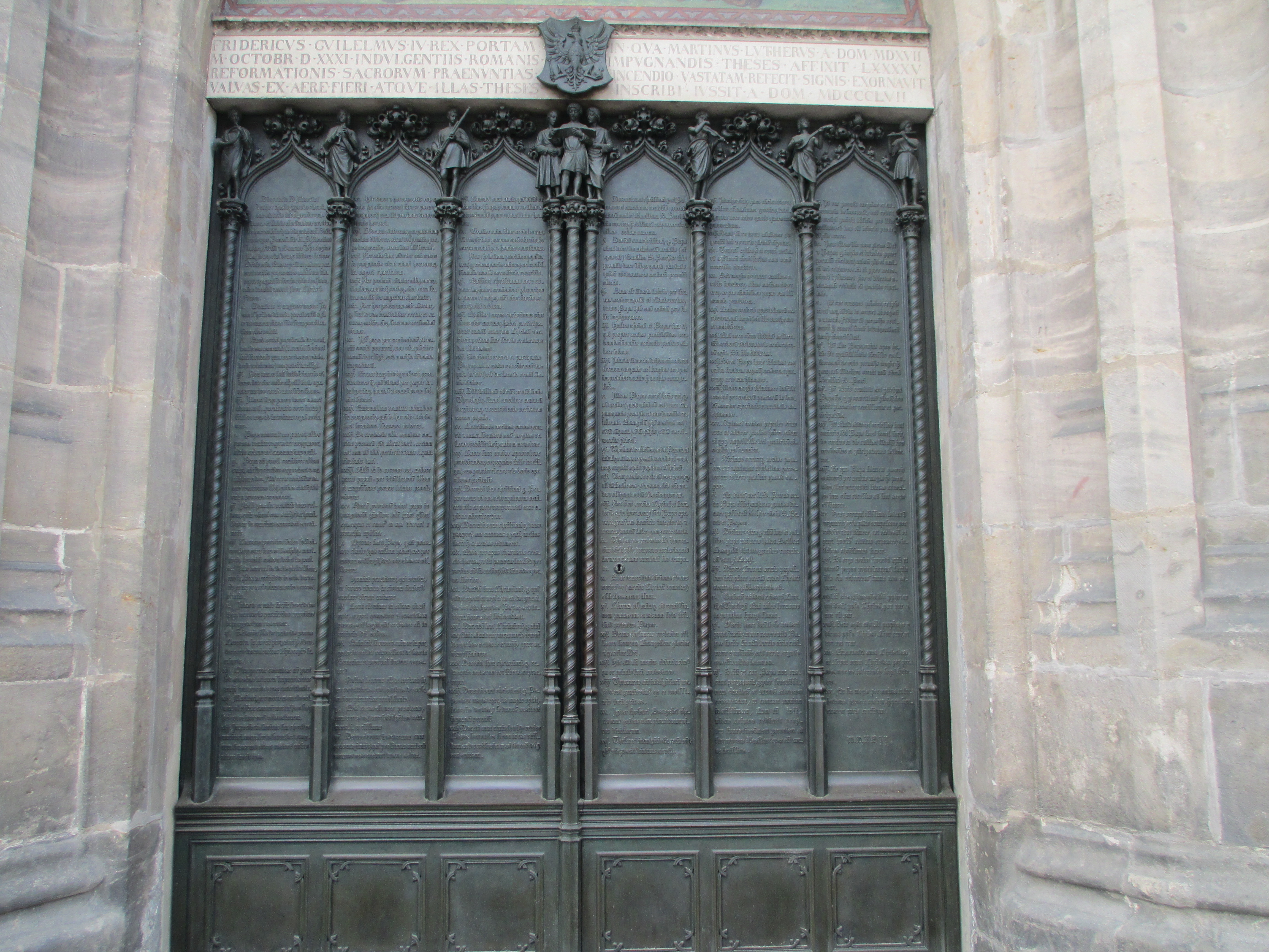 דלתות 95 התזות בכנסיית הטירה (כל הקדושים) בוויטנברג